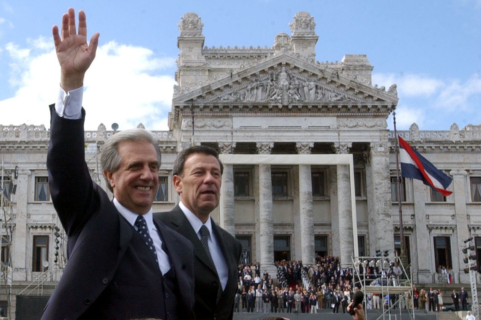 Tabaré Vázquez y Rodolfo Nin en la asunción presidencial (Marcello Casal Jr/ABr) Original file name: 86197.jpeg Original caption: ::Montevidéu (Uruguai) - O presidente do Uruguai, Tabaré Vazquéz e seu vice, Rodolfo Nin Novoa, seguem em carro aberto do Palácio Legislativo(ao fundo) até o Palácio da Independência . Foto: Marcello Casal Jr/ABr